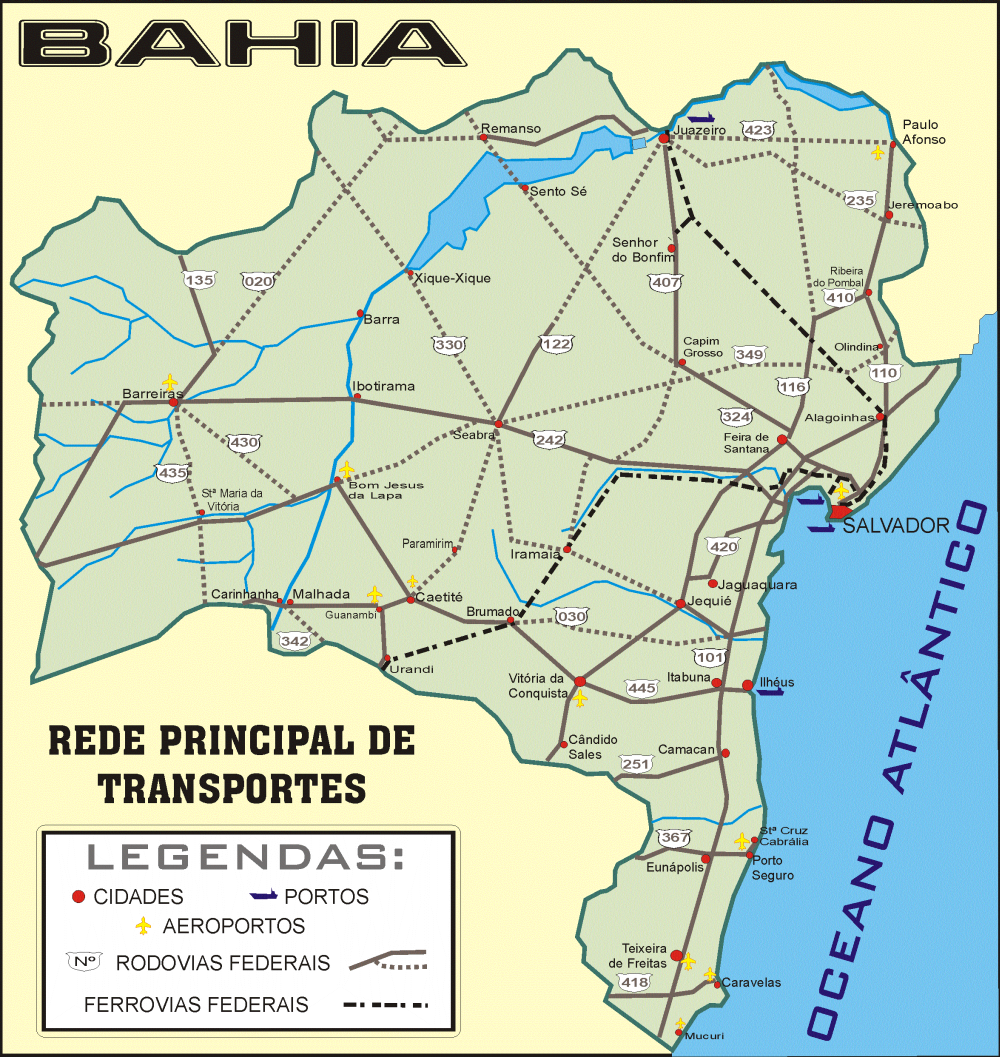 Bahia's Map (transports).